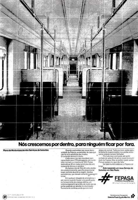 Anúncio publicitário de Fepasa apresentando o interior de um dos 18 novos trens metropolitanos importados da França.